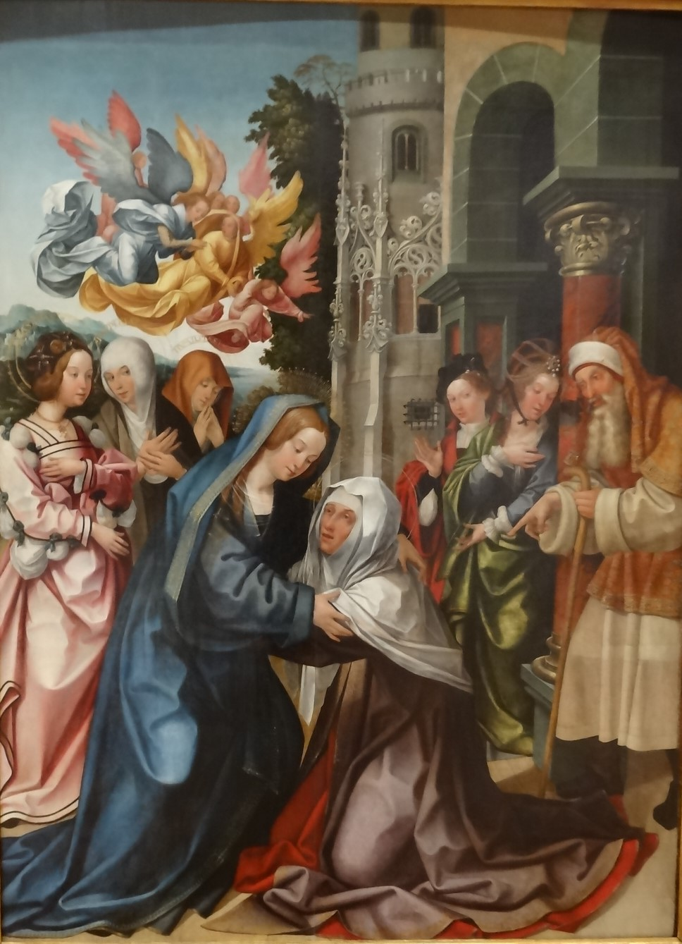 Visitação, do Políptico da Capela do Salvador, pintura a óleo sobre madeira criado no período de 1520 a 1525, tratando-se provavelmente de obra colectiva com participação proeminente dos artistas portugueses do Renascimento Gregório Lopes e Jorge Leal, actualmente no MNAA